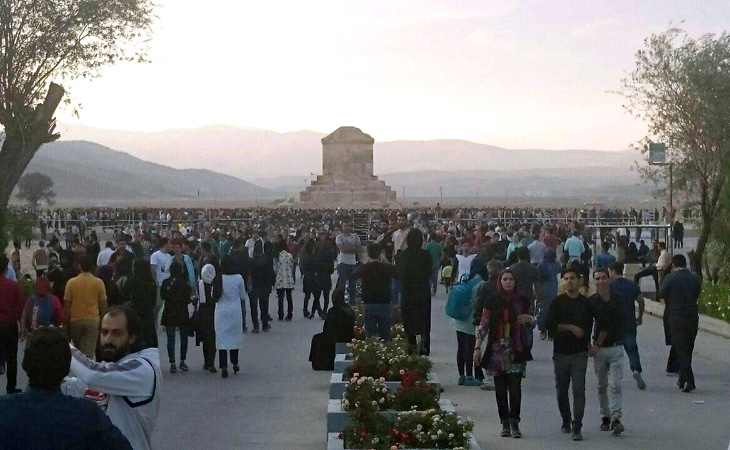 گردهمایی مردمی هفتم آبان سال ١۳۹۴